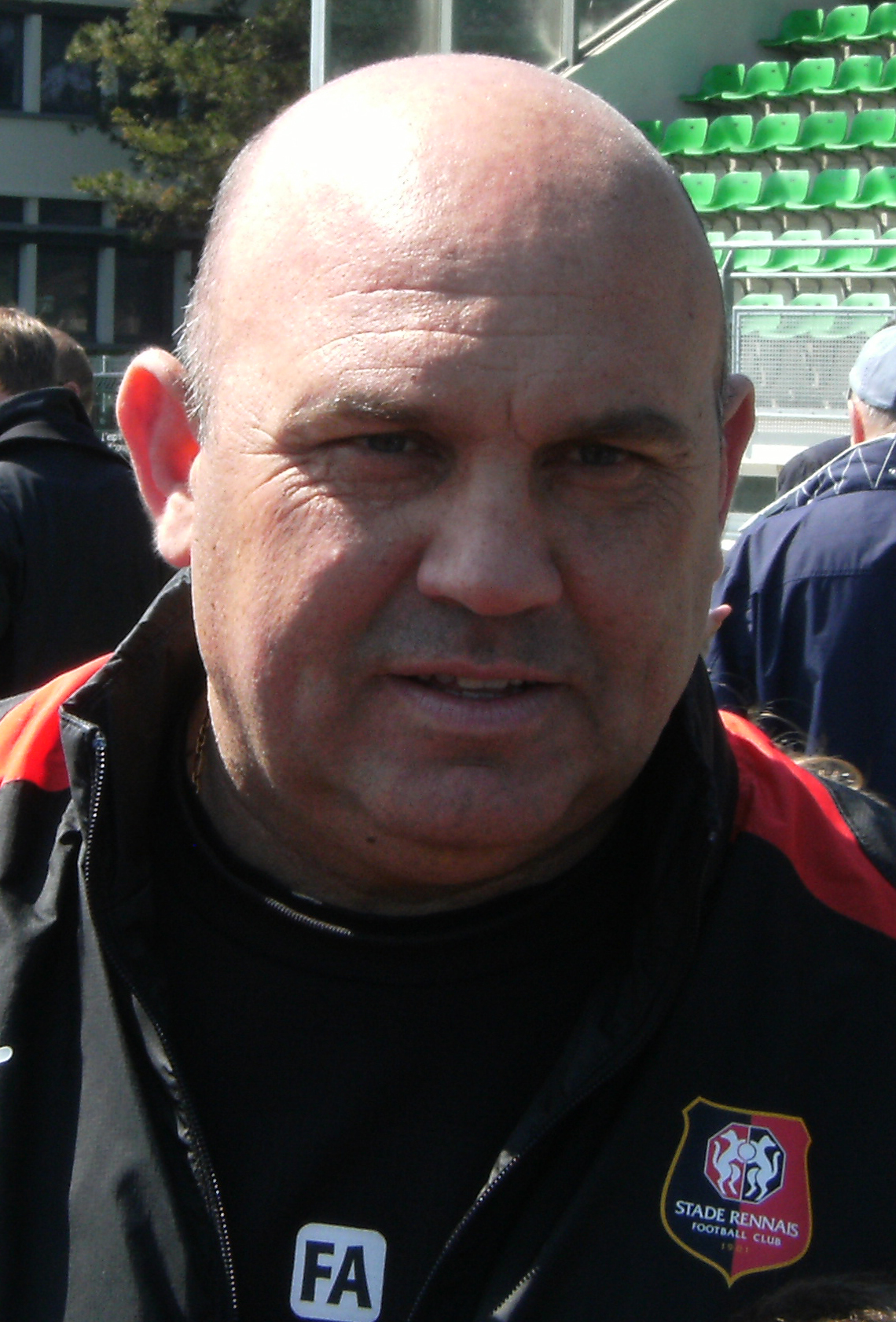 Photo prise lors d'un entraînement du Stade rennais au stade de Marville de Saint-Malo le 3 mai 2013. Frédéric Antonetti pose avec un jeune supporter.